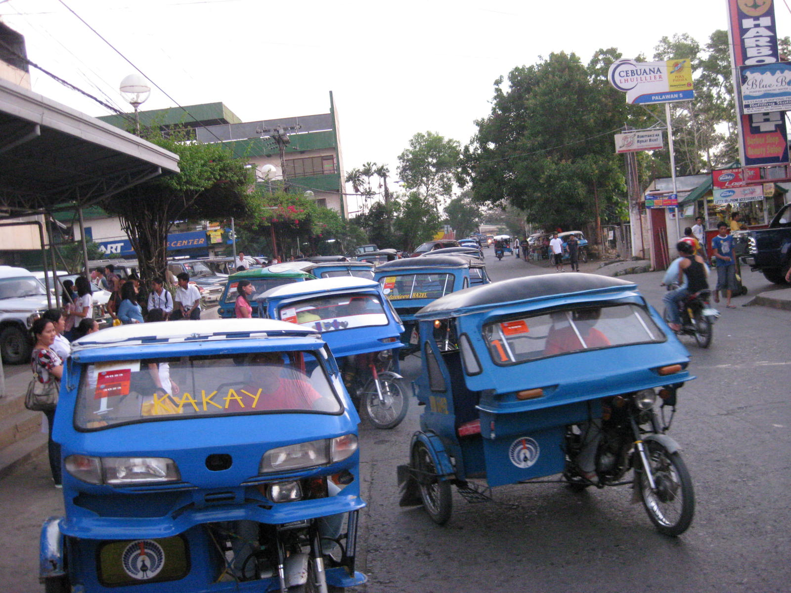 Puerto Princesa Tricycles